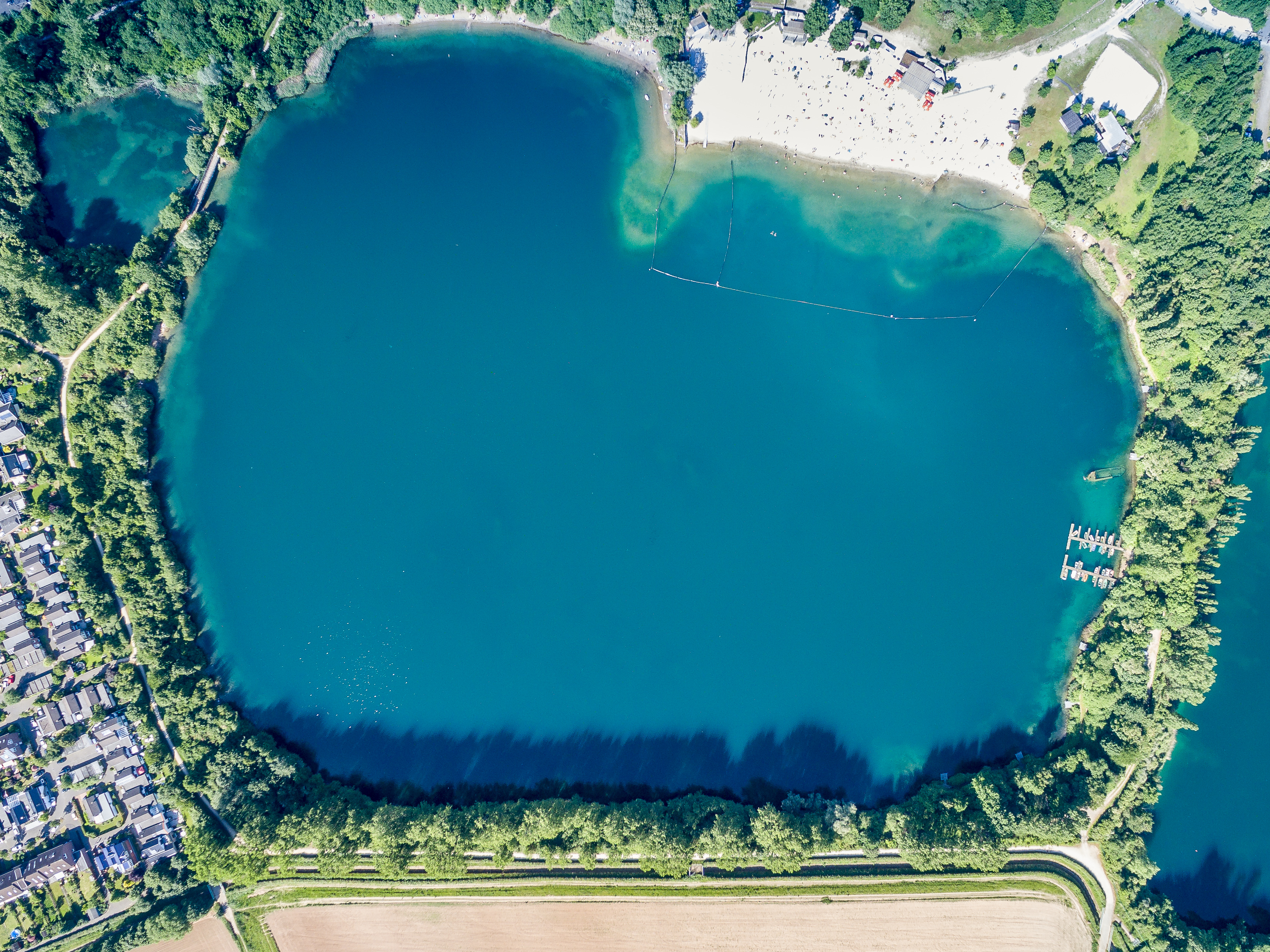 Luftbildaufnahme des Escher Sees in Köln. Aerial footage from Cologne